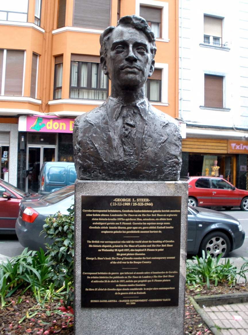 Guernica - Monumento a George L. Steer